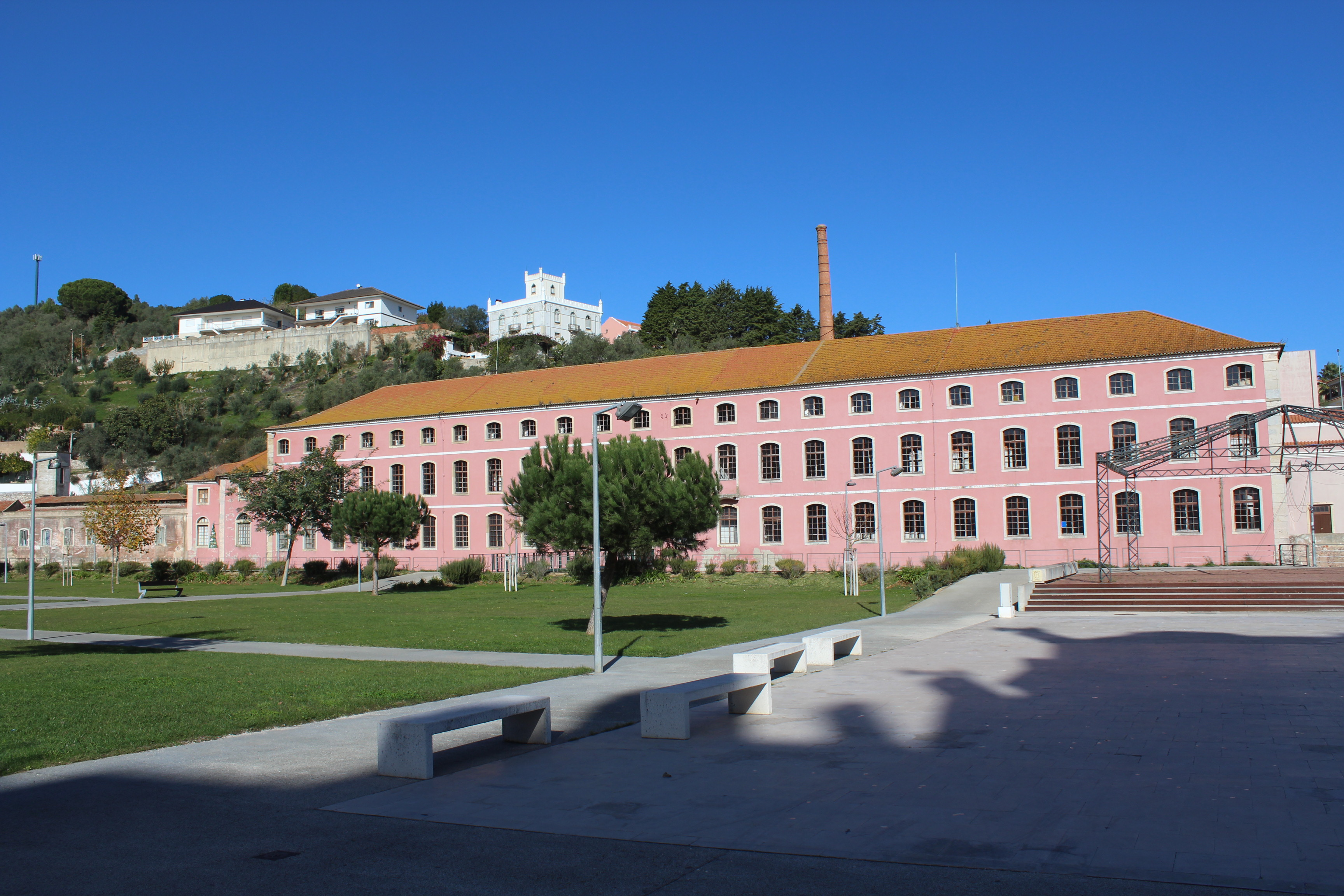 Fábrica Nova da Romeira, Alenquer